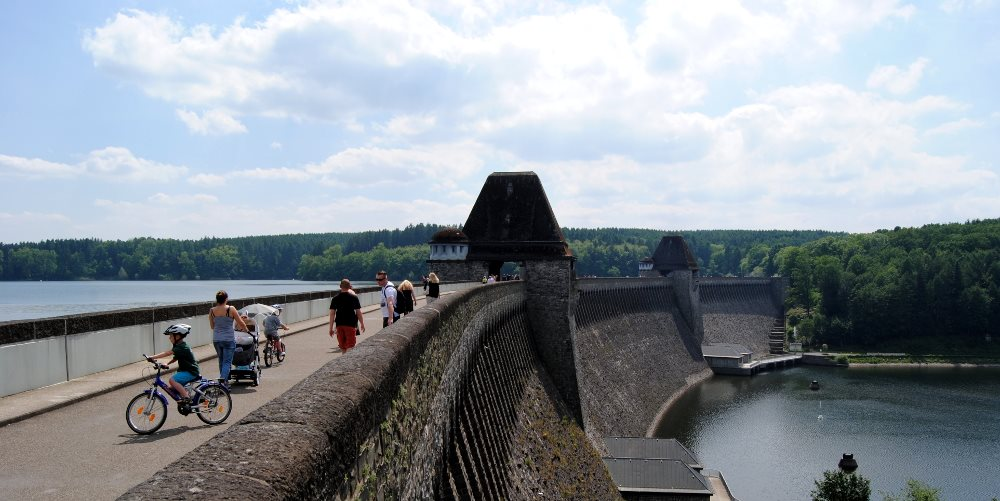 Mionės tvenkinio užtvanka